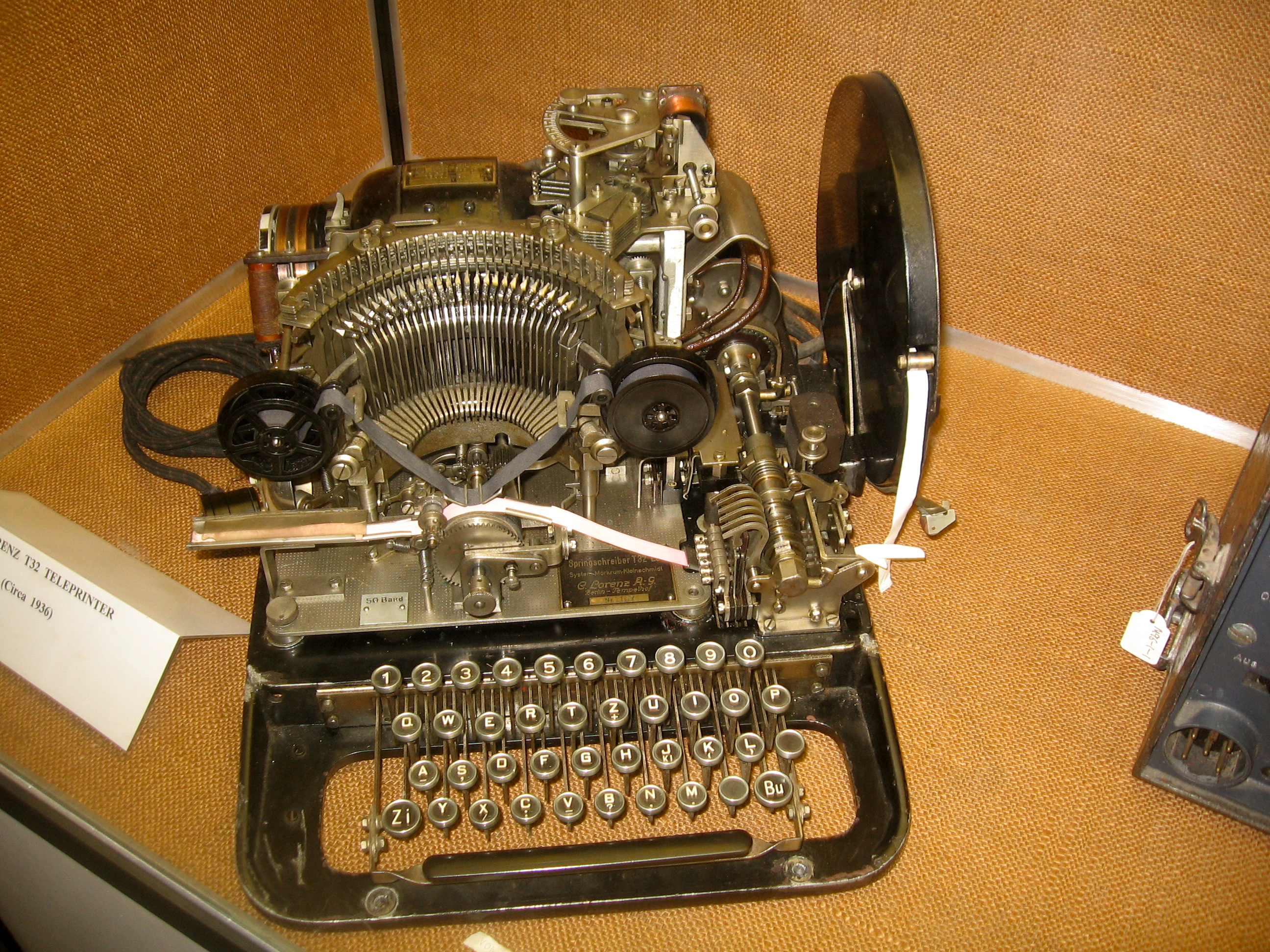 Teleprinter